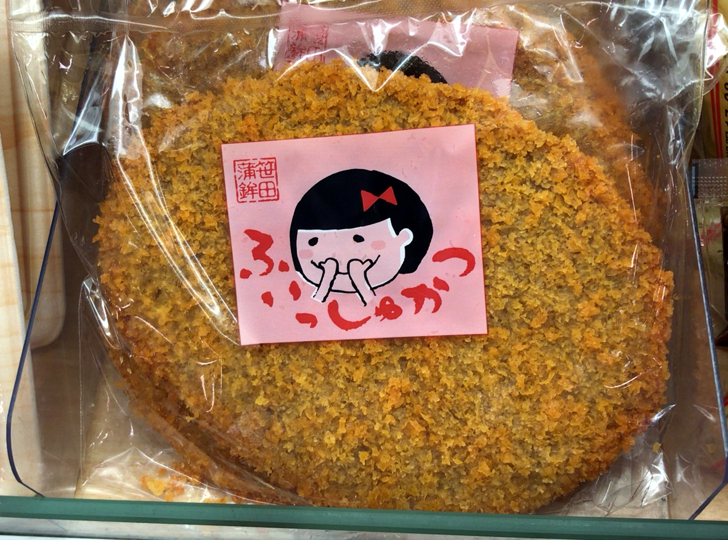 徳島県で販売されるフィッシュカツの一例